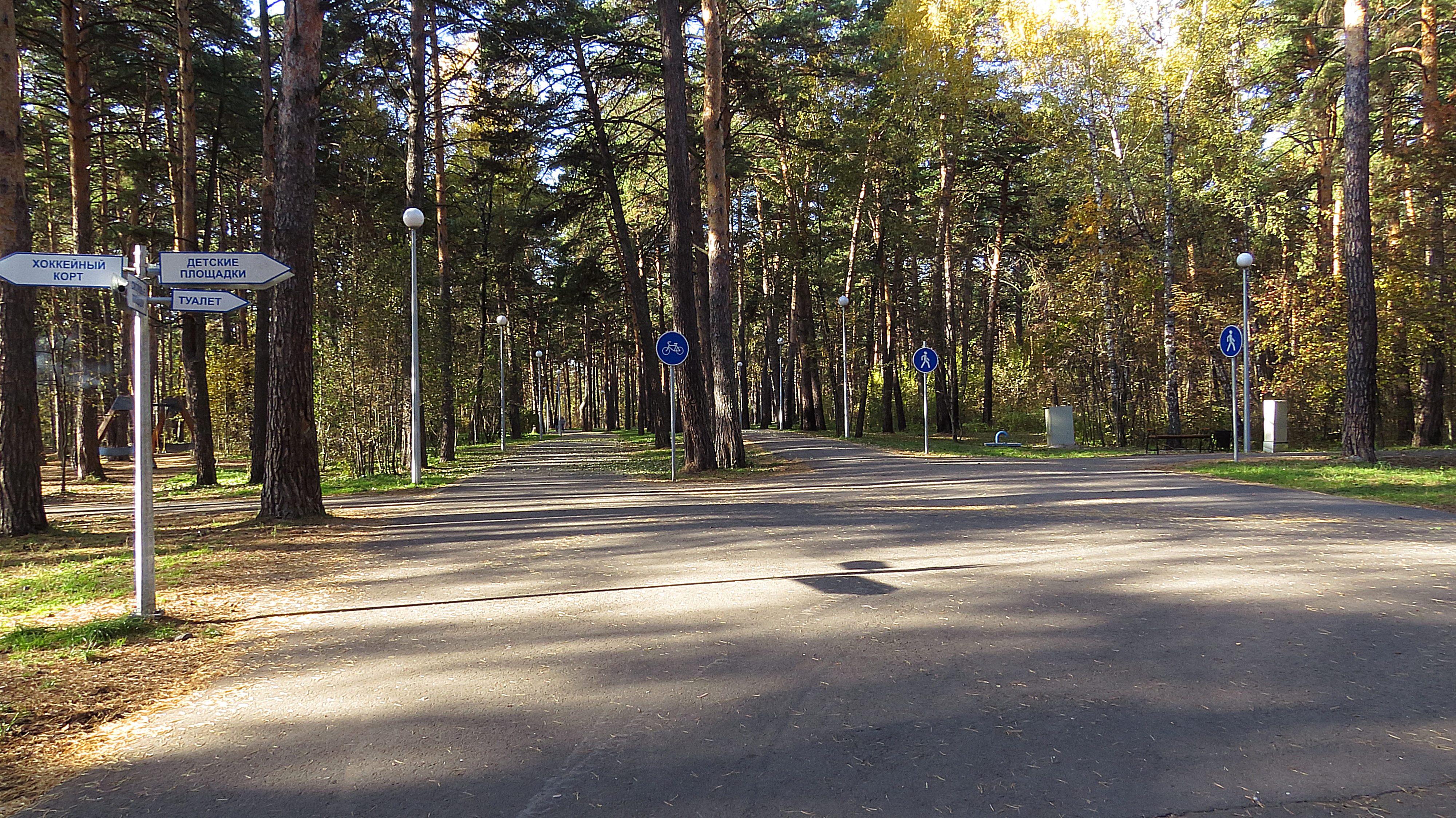 Гилевская роща: Тюмень, Тюменская область This image is related to the protected area of Russia number 7230137